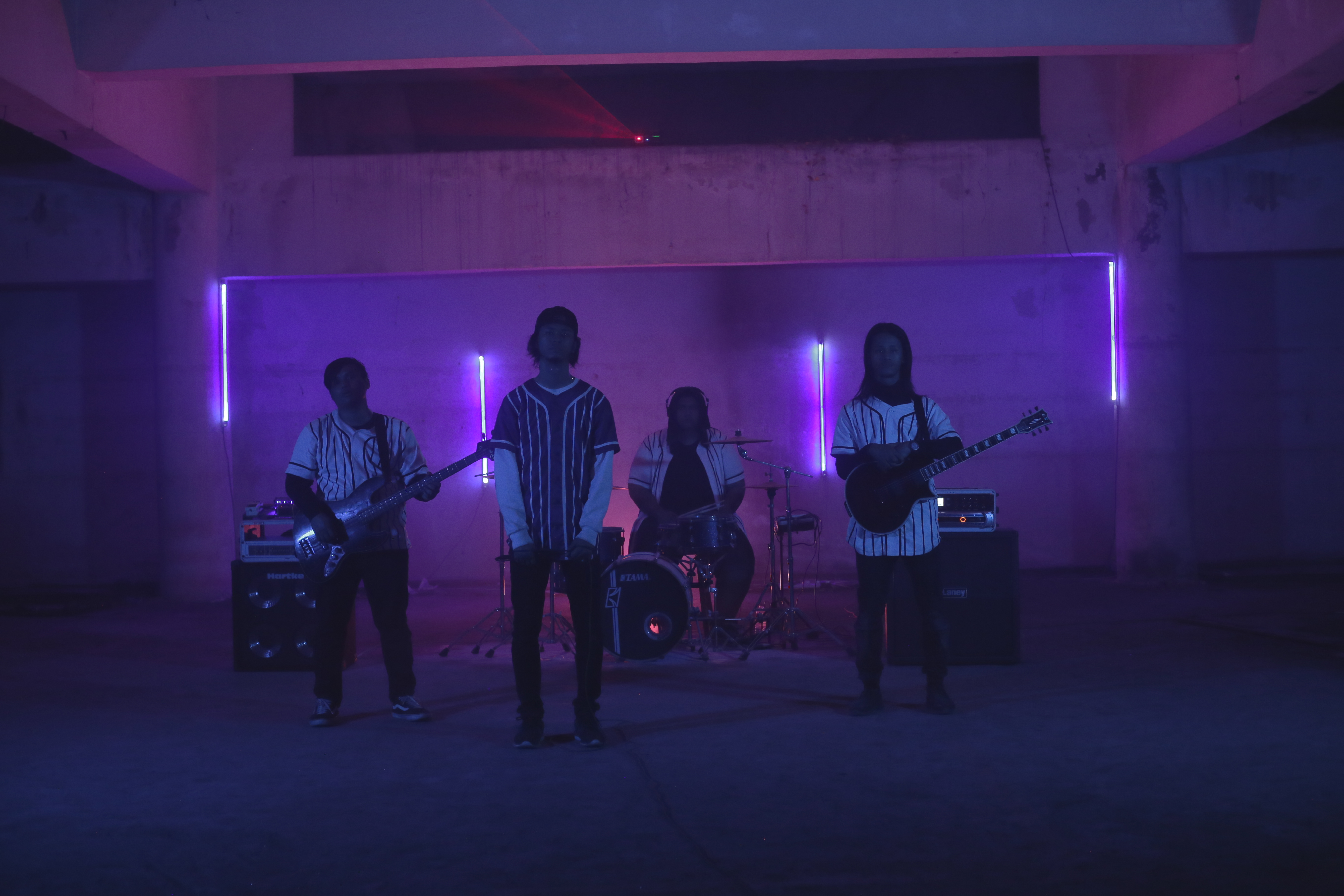 Taken from Operahaus - Greyscale In 14 Lines MV